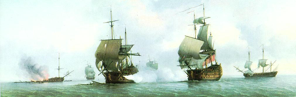 Tableau de la fin du XVIIIème siècle représentant le combat soutenu par le navire espagnol Glorioso contre plusieurs bâtiment britannique en septembre 1747.